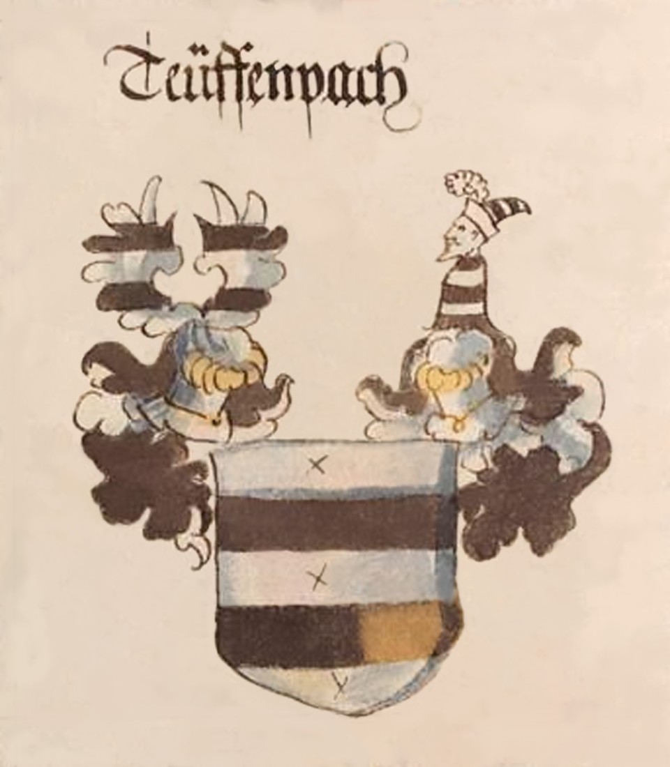 Wappen der Teuffenpach - Wappensammlung - BSB Cod.icon. 307; Seite 192. (Anmerkung: der goldgelbe Fleck im unteren Balken des Wappens ist eine Verfärbung. Der Balken ist korrekt ganz schwarz.)